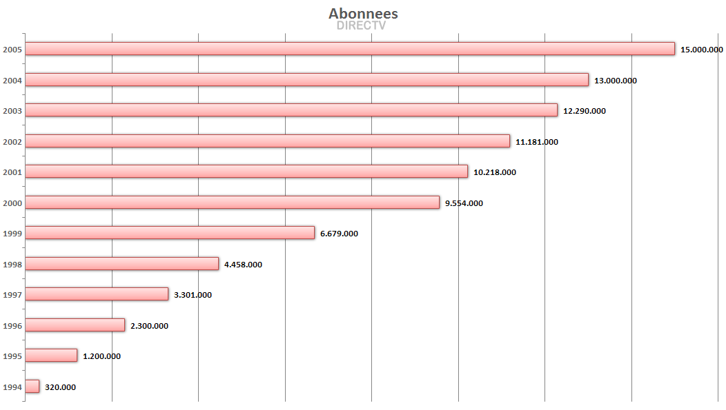 Zelfgemaakt op basis van betrouwbare informatie.